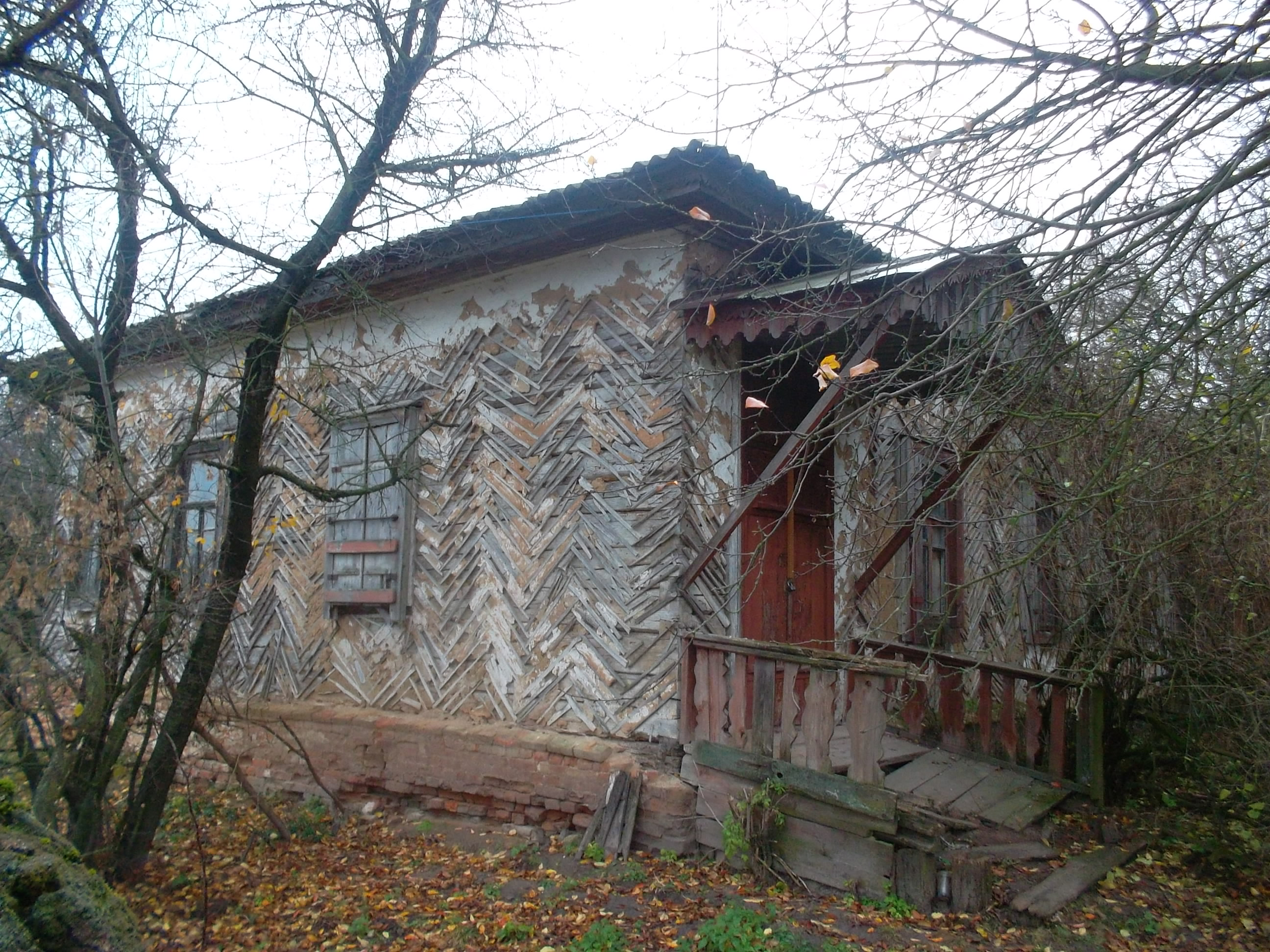 Будівля початкової школи